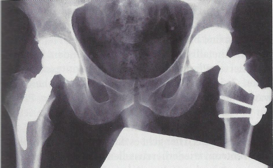 Zementfreie Hüftendoprothesen mit sog. Kurzschäften: ESKA Cut (li.) und Druckscheibe (Thomas)